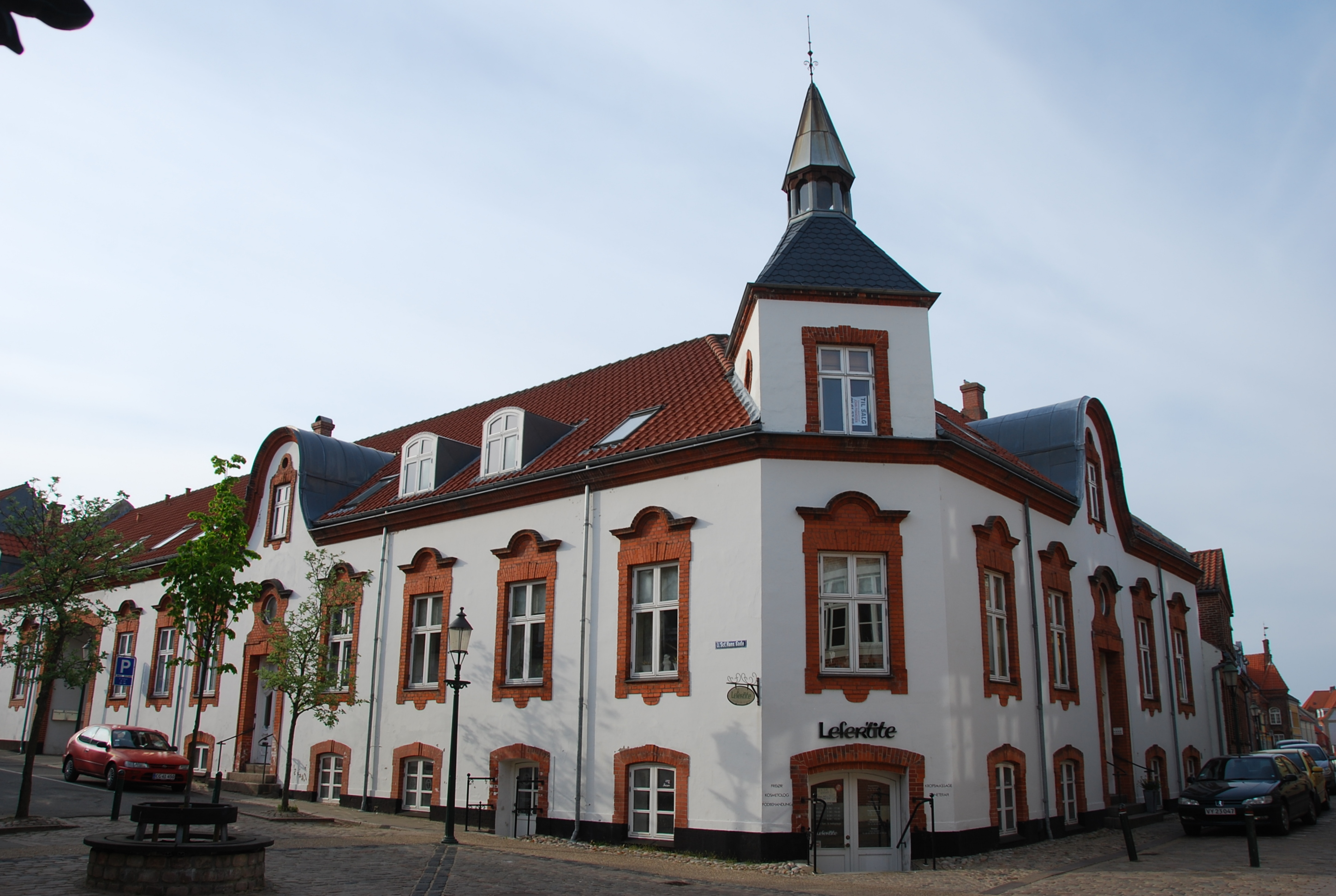 Daas Palæ på Sct. Mogens Gade 17 i Viborg. Tegnet i 1892 af arkitekterne Claudius August Wiinholt og Andreas Hagerup.